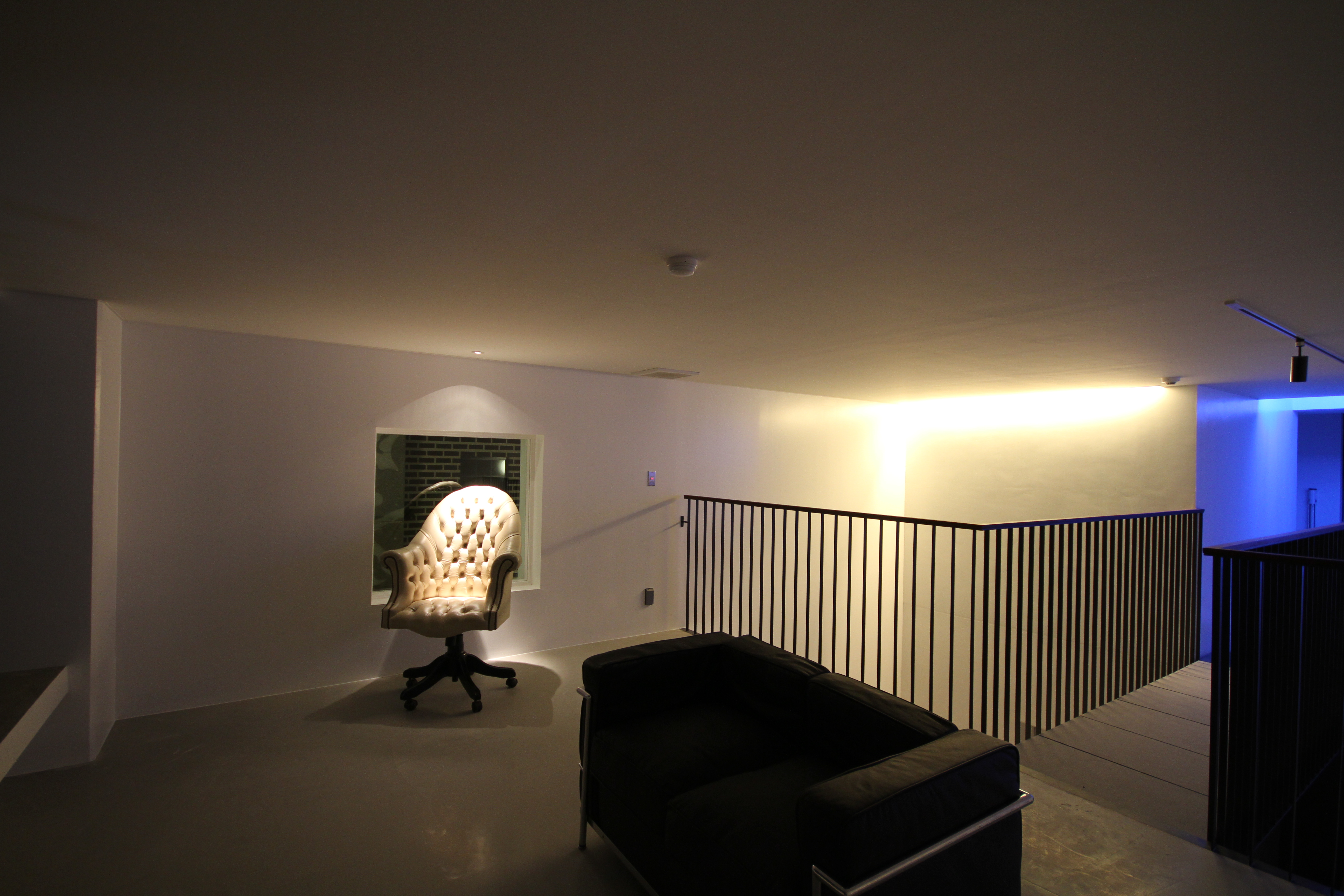 フラットガゼレイ エントランス（２階）